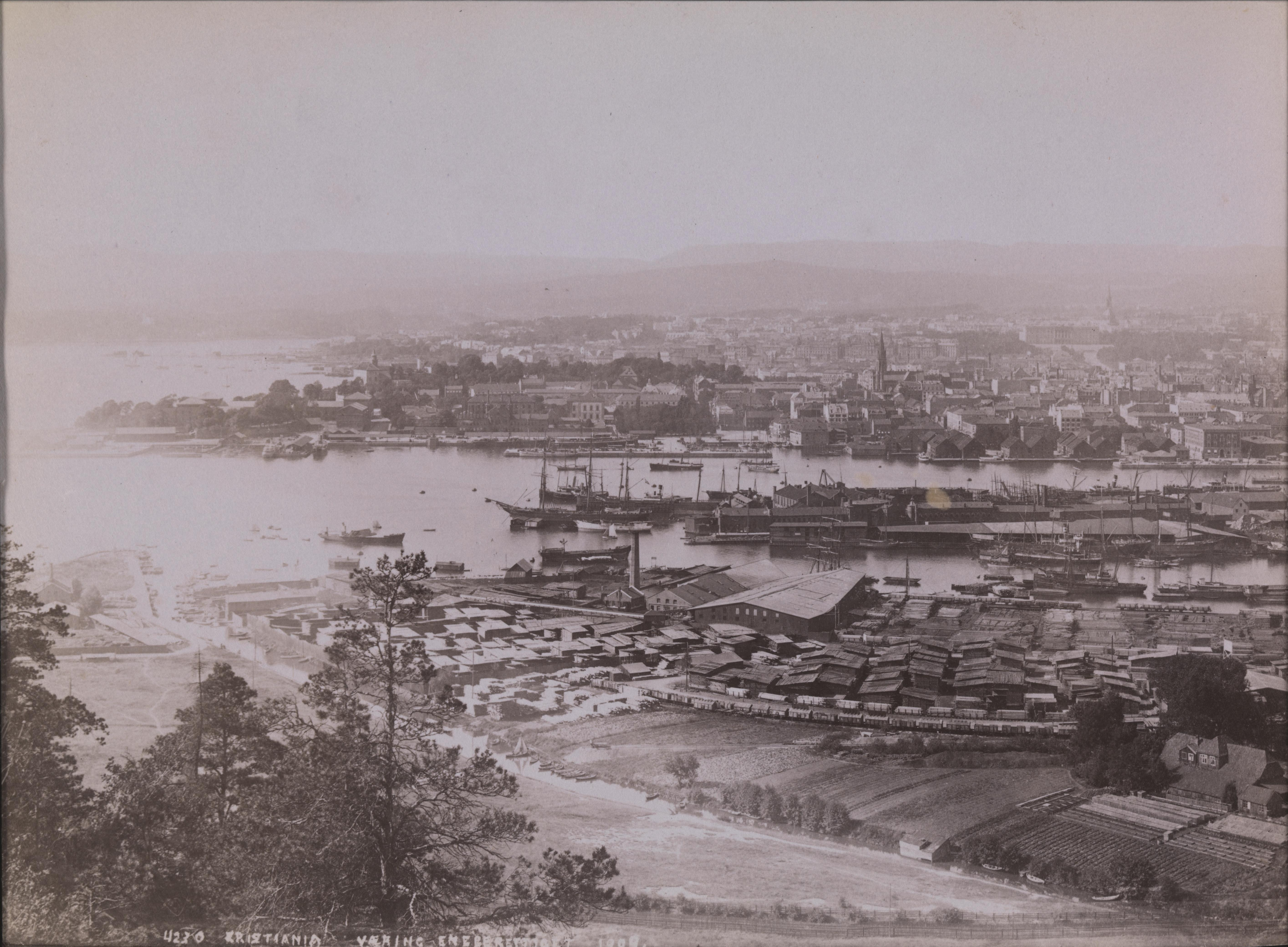 Bildet er hentet fra Nasjonalbibliotekets bildesamling